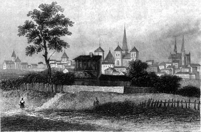 Image en provenance du livre : Eusèbe Girault de Saint-Fargeau, Guide pittoresque du voyageur en France, contenant la statistique et la description complète des quatre-vingt-six départements, orné de 740 vignettes et portraits gravés sur acier, de quatre-vingt-six cartes de départements et d'une grande carte routière de la France, par une Société de gens de lettres, de géographes et d'artistes, Paris, F. Didot frères, 1838, 6 volumes in-8° (BNF : 8-L25- 46). Volume III Didot frères, 1838. Route de Paris à Nice traversant les départements de l'Isère, des Hautes-Alpes, des Basses-Alpes et du Var. auteurs dessins : Rauch (ou autre) auteurs gravures : Skelton fils, Schroeder, Bishop (ou autre)